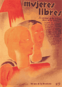 Le numéro 9 de la revue des Mujeres Libres (« Femmes libres » en espagnol), organisation féministe libertaire espagnole.